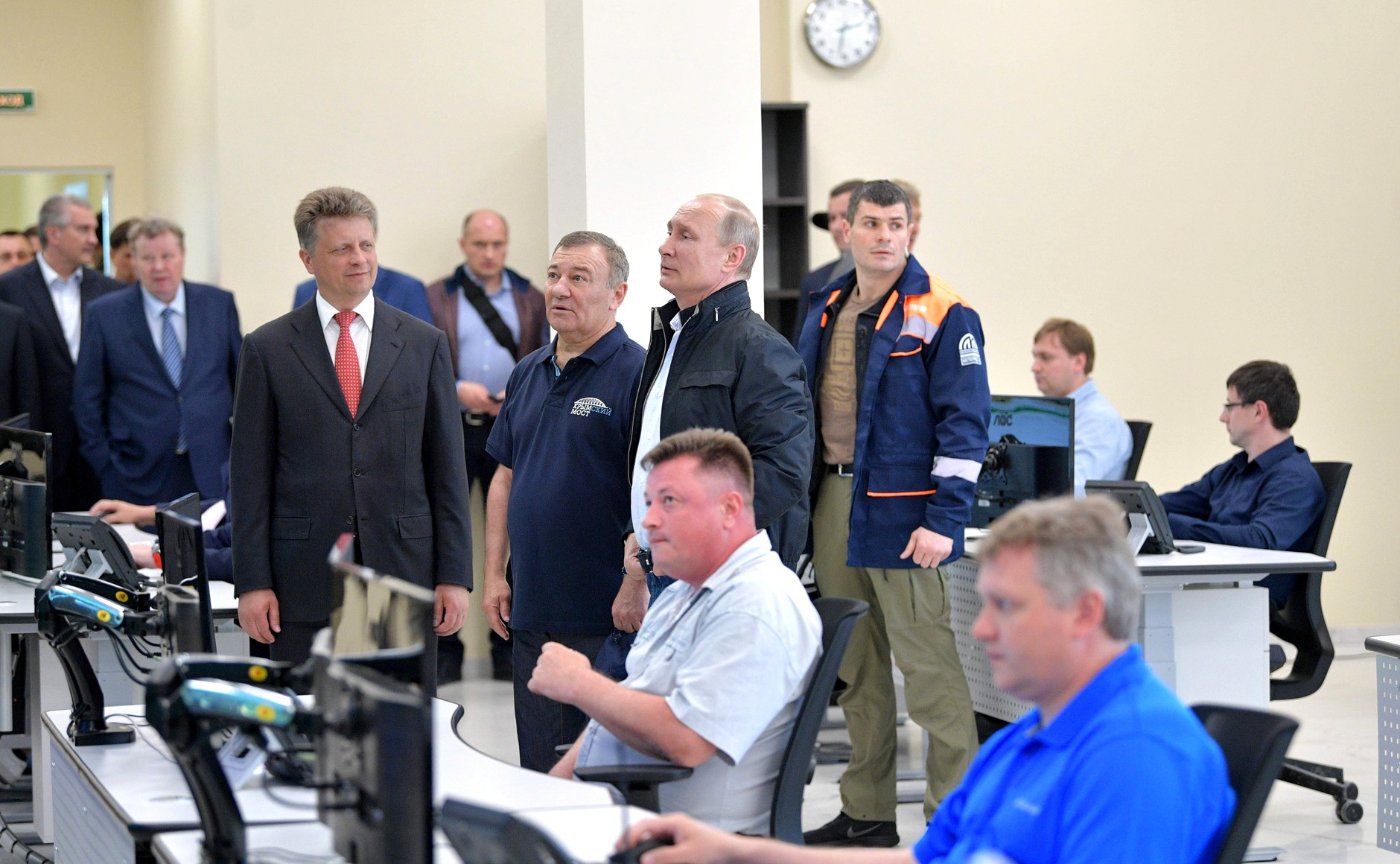 Открытие Крымского моста